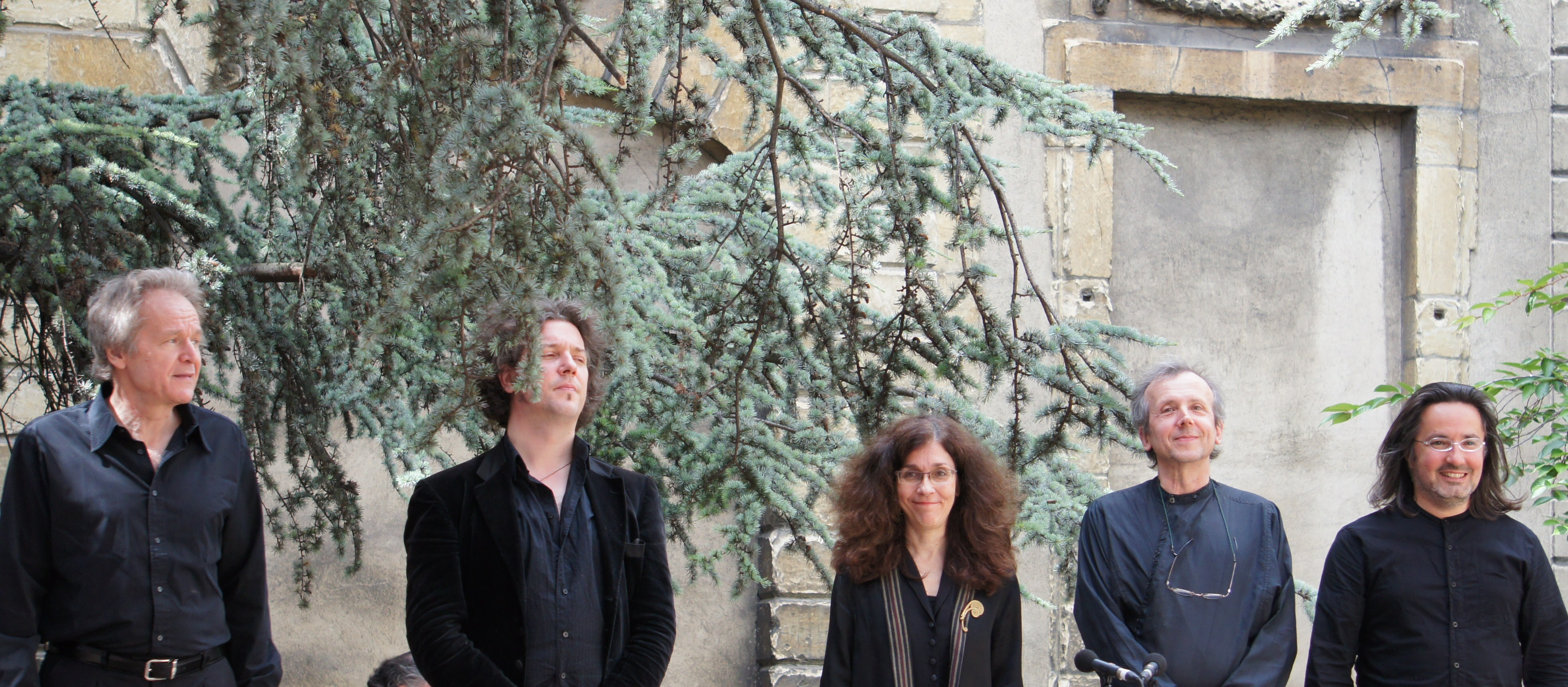 lors des Flâneries musicales 2013, Alla Francesca à l'hôtel le Vergeur .